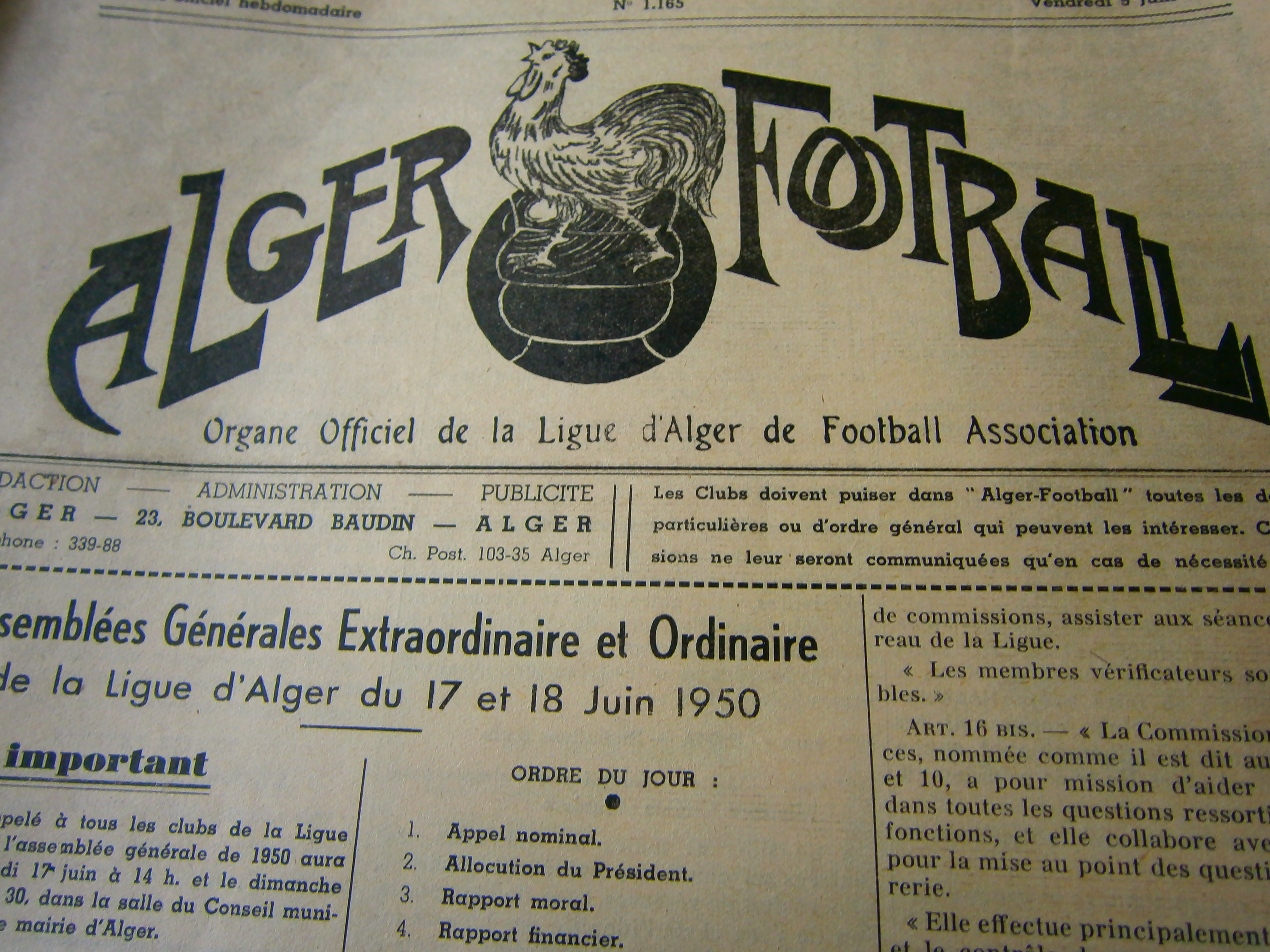 Alger Football, organe officiel de la Ligue d'Alger de Football Association. (Ancien hebdomadaire sportif de l'époque coloniale en Algérie).